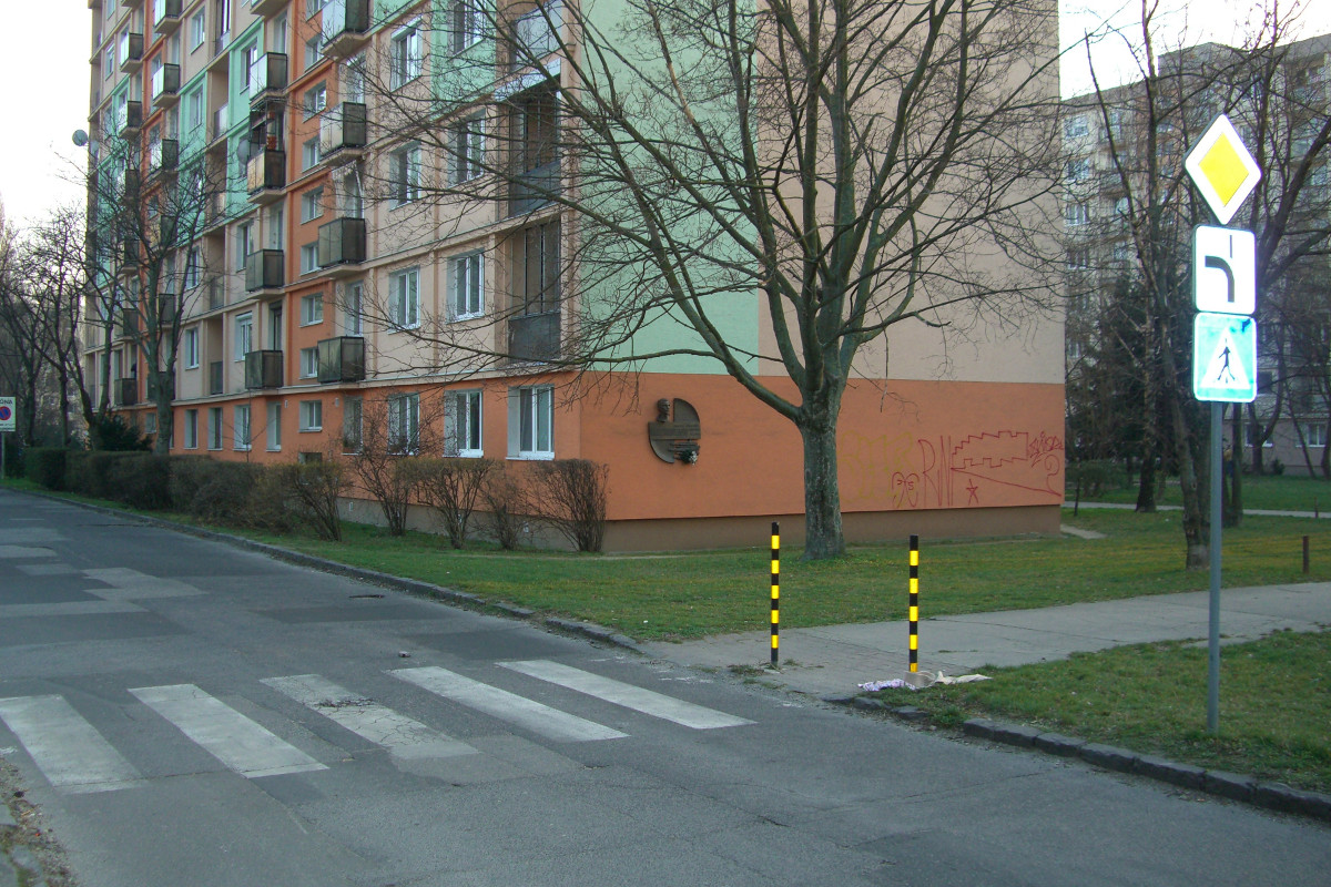 Pamatna tabula Janka Cmelika, Bratislava/Ruzinov/Posen